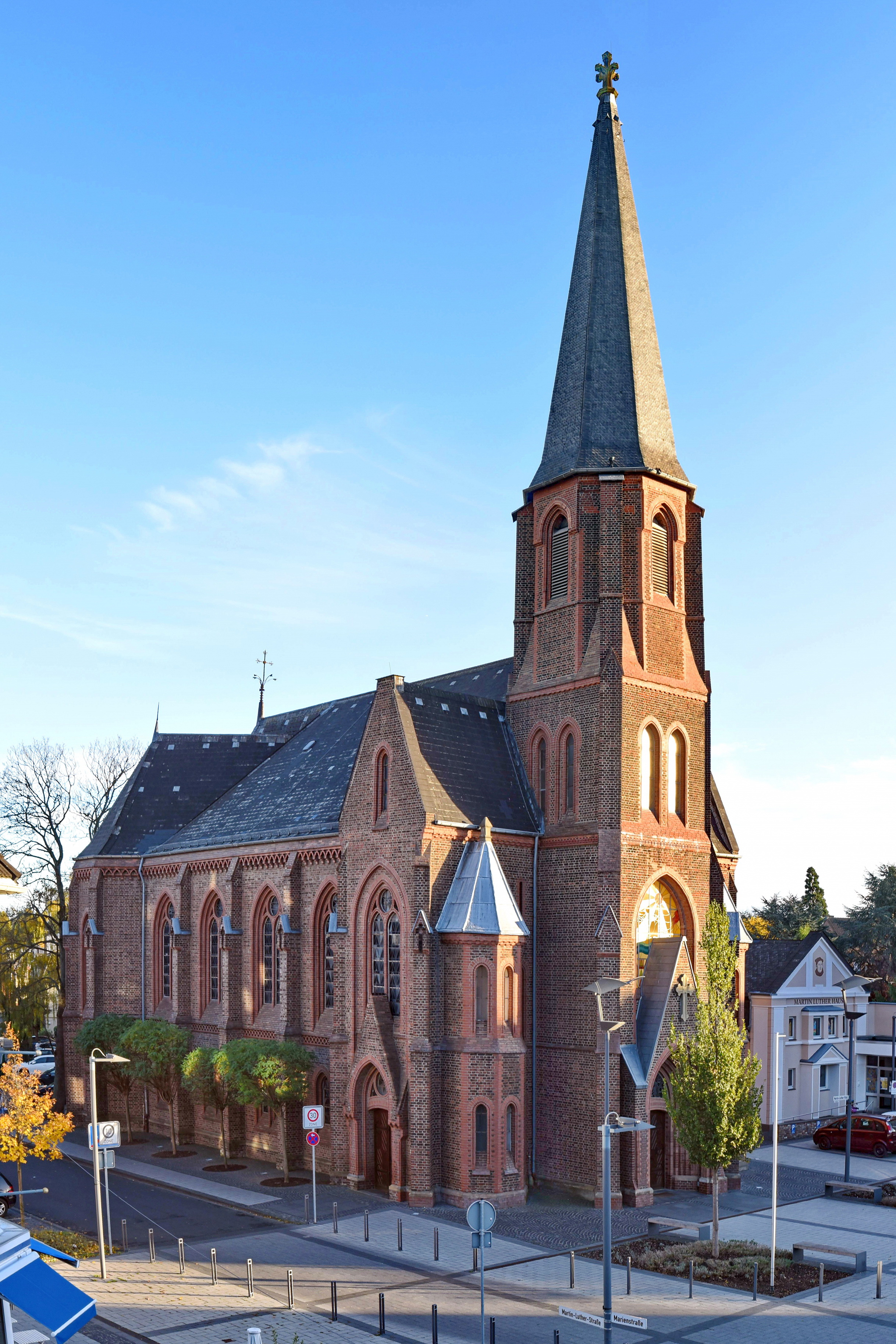 Ev. Dreieinigkeitskirche Außenansicht